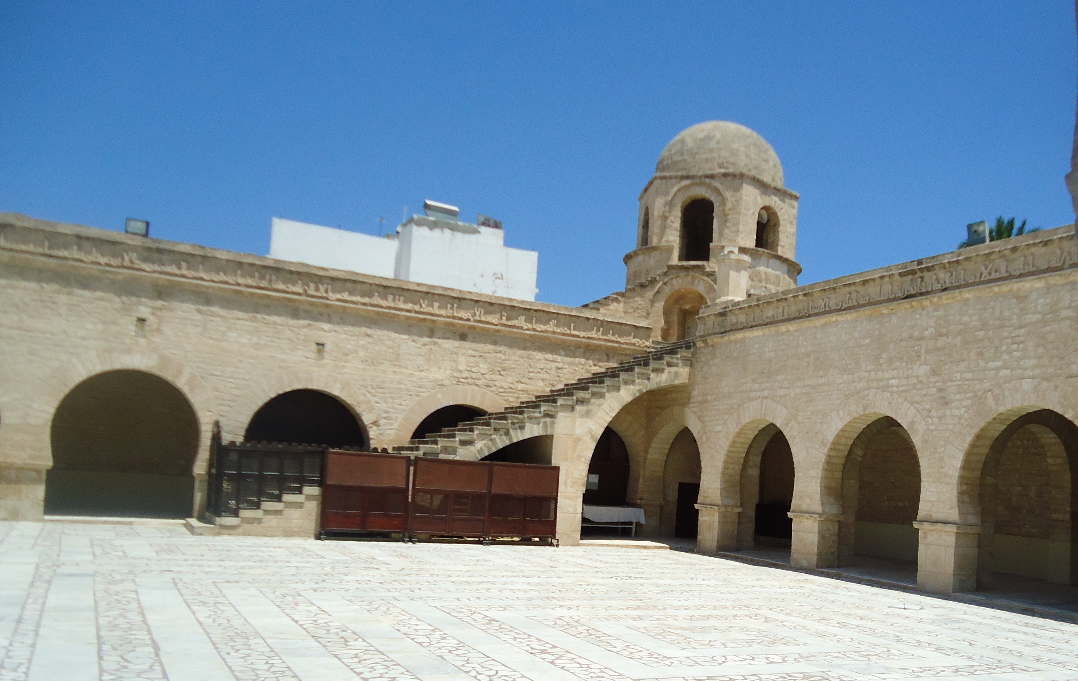 Тунис. Сүс ҡалаһындағы Бөйөк мәсет